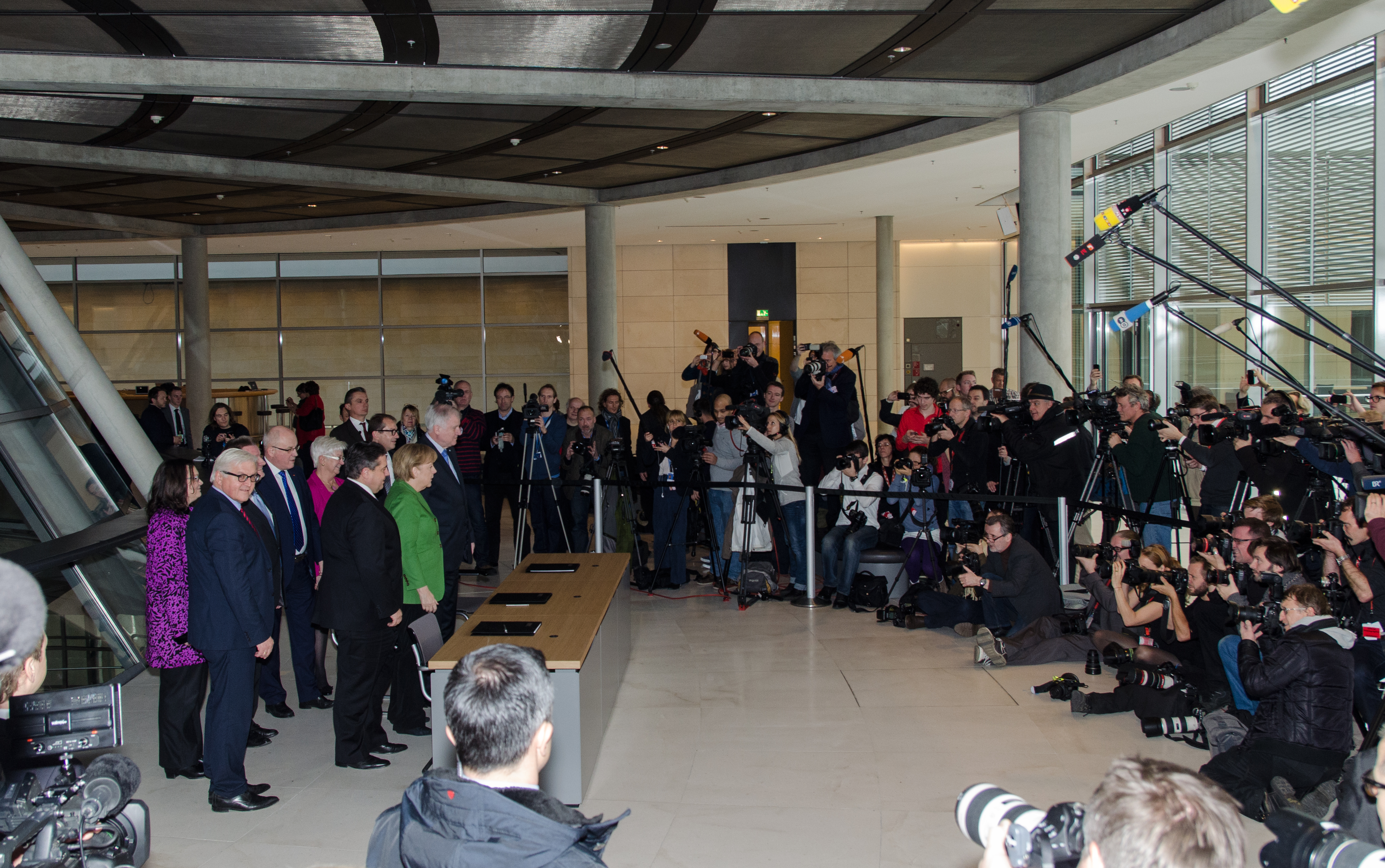 Die Parteivorsitzenden der CDU (Angela Merkel), CSU (Horst Seehofer) und SPD (Sigmar Gabriel) unterzeichneten am 27.11.2013 im Reichstagsgebäude die in der Nacht zuvor fertig gestellte Koalitionsvereinbarung. Bei der Unterzeichnung waren ebenfalls anwesend: Andrea Nahles (SPD), Frank-Walter Steinmeier (SPD), Volker Kauder (CDU), Gerda Hasselfedlt (CSU), Hermann Gröhe (CDU) und Alexander Dobrindt (CSU).